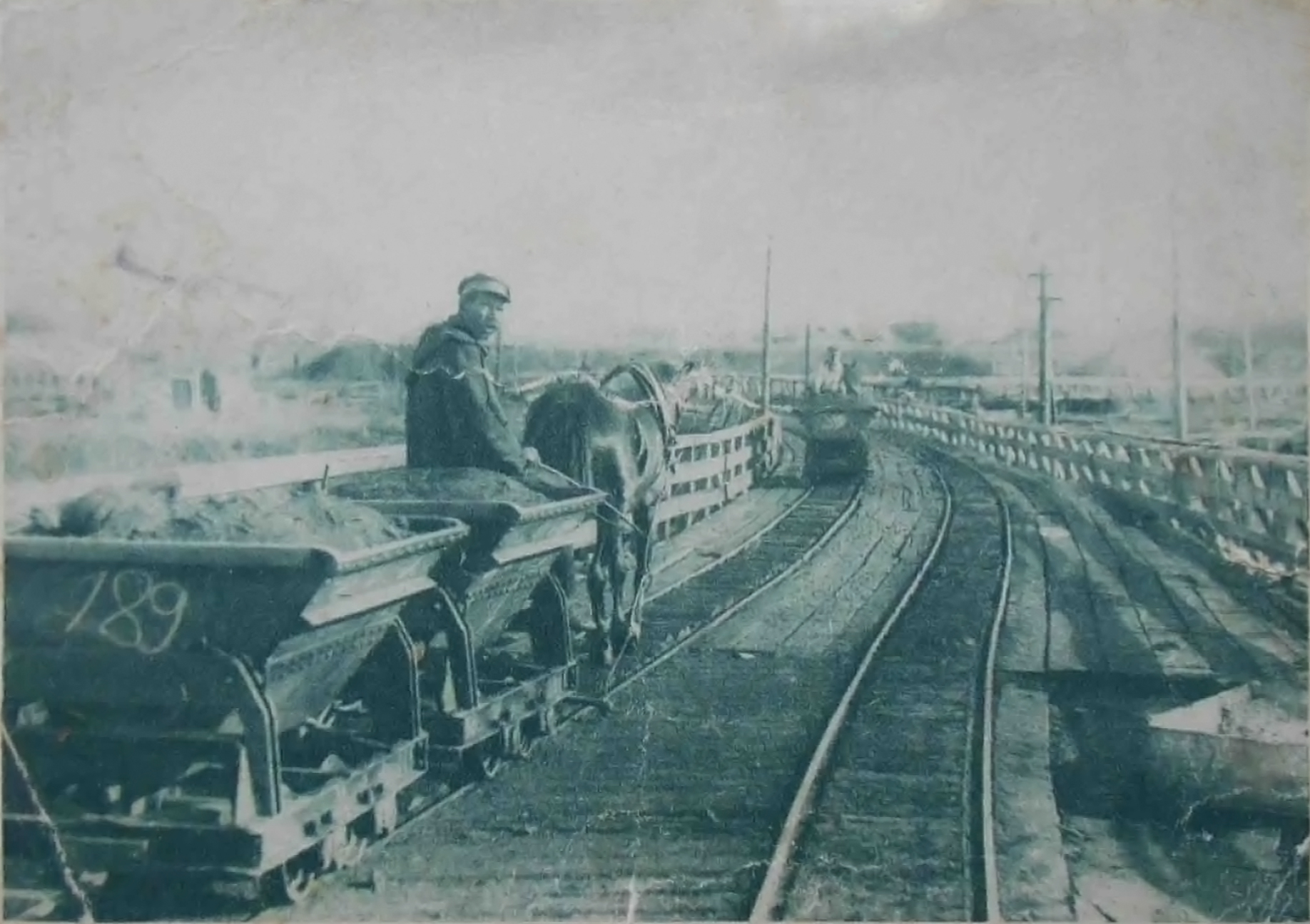 Криворожье. Дзержинское рудоуправление. Транспортировка руды. 1931